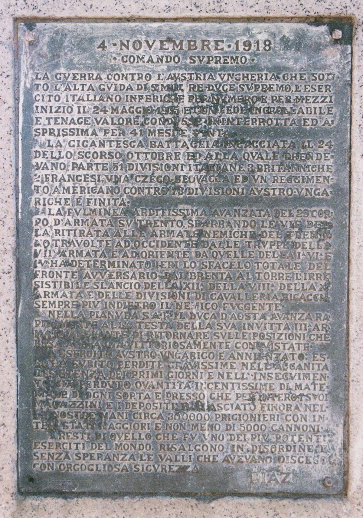 Fara Novarese, Piazza della Stazione, Monumento ai Caduti. Epigrafe con il Bollettino della Vittoria del Generale Diaz.